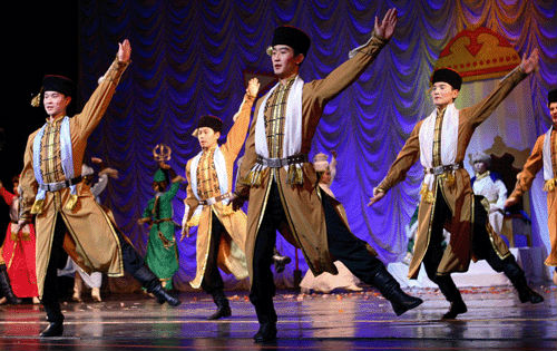 Kalmyks